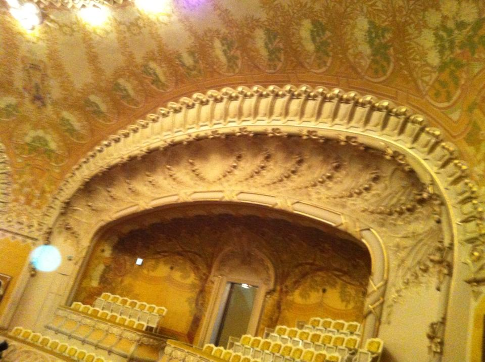 Le 2eme étage de l’opéra de Vichy